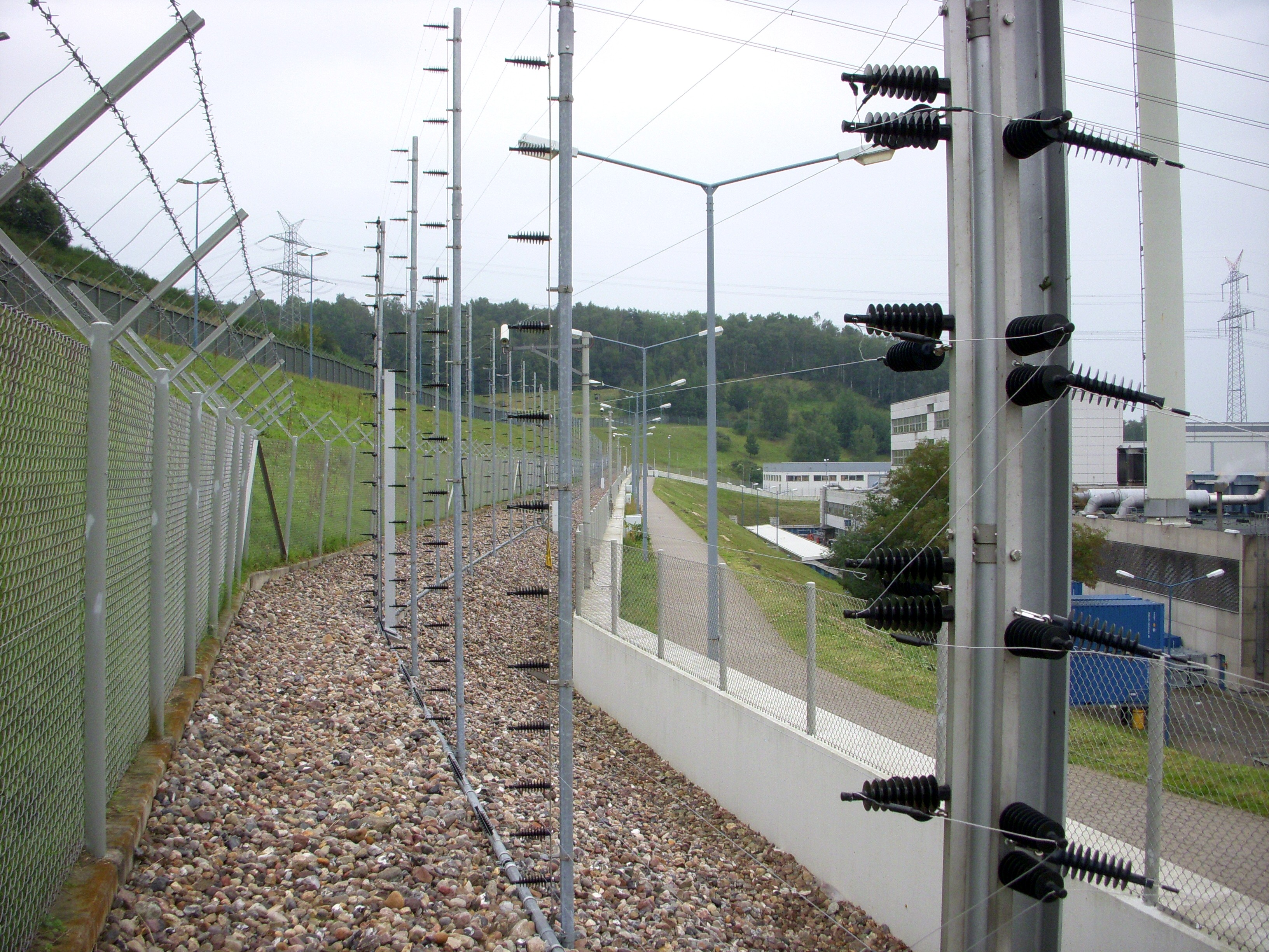 Kraftverk Krümmel, säkerhetsinhägnad